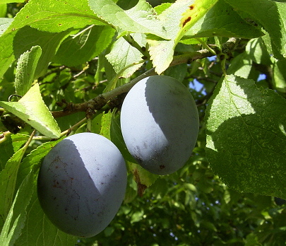 Zwei reife Zwetschgen